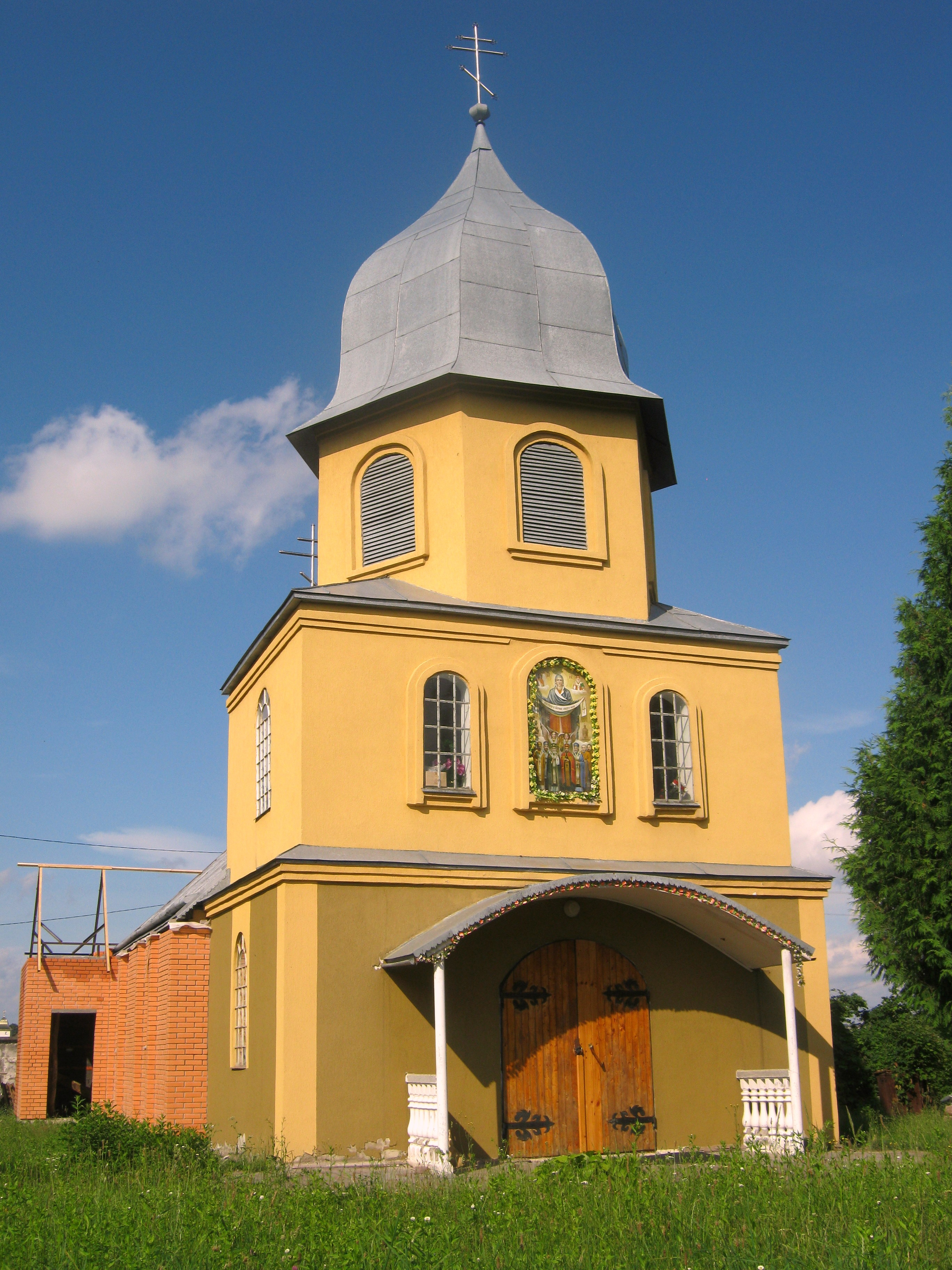 Каплиця "Всіх Святих землі руської" (автокефальна православна конфесія) у селі Зимна Вода Пустомитівського району Львівської області